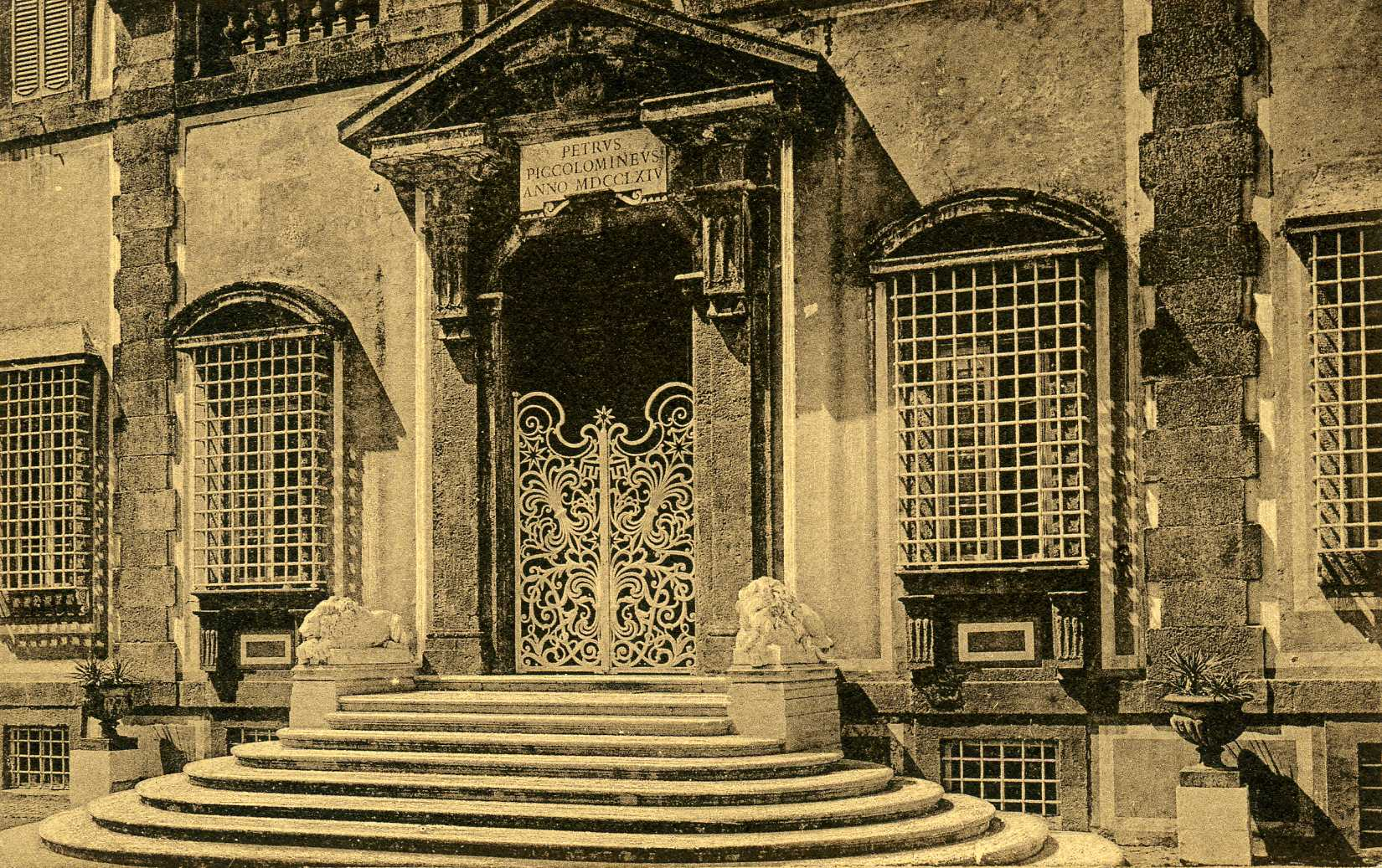 Cartolina illustrata d'inizio secolo (1907/1910) che ritrae il cancello d'ingresso del Palazzo di Villa Lancellotti in Frascati (RM)